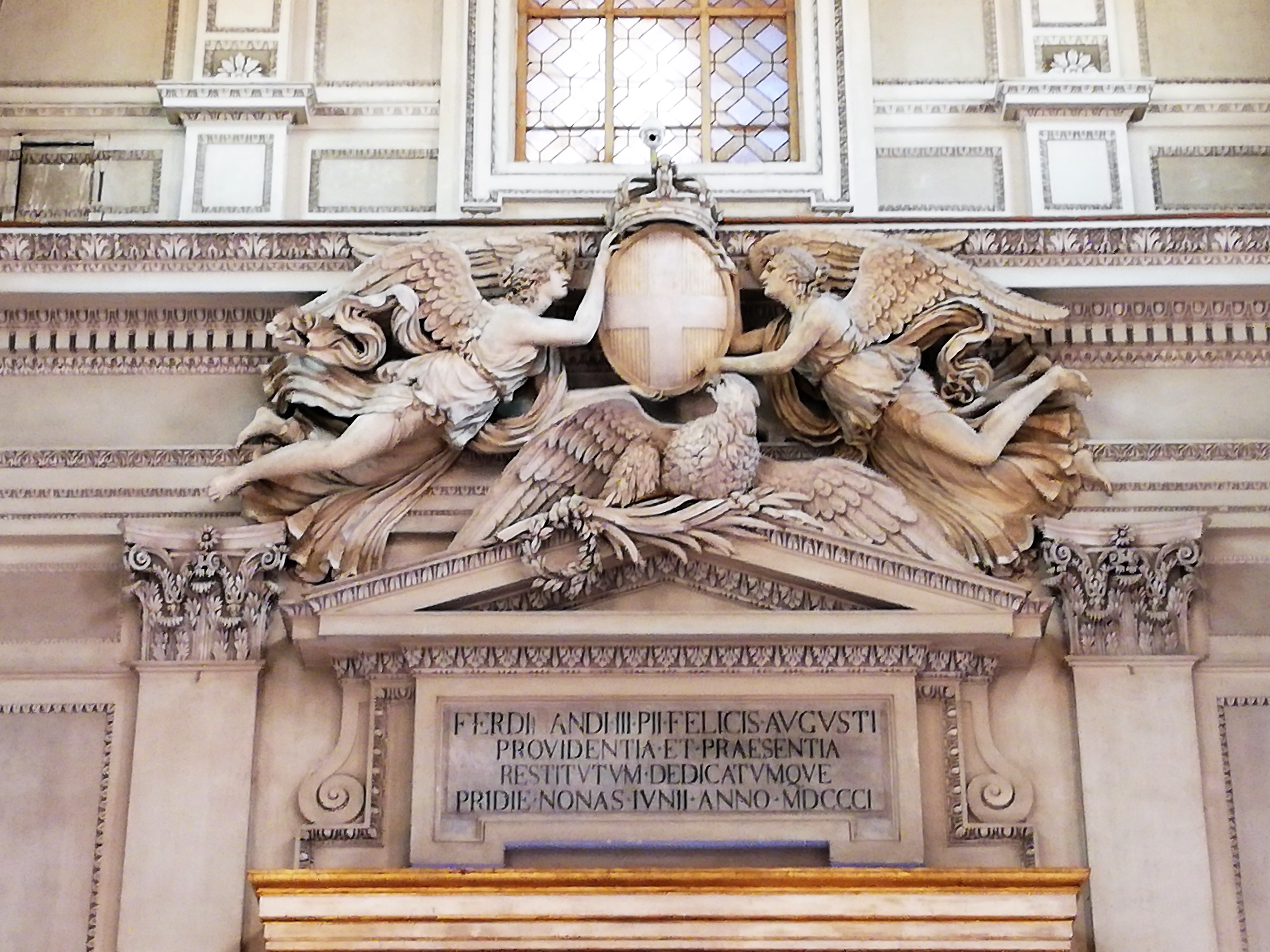 Fregio interno portale maggiore.